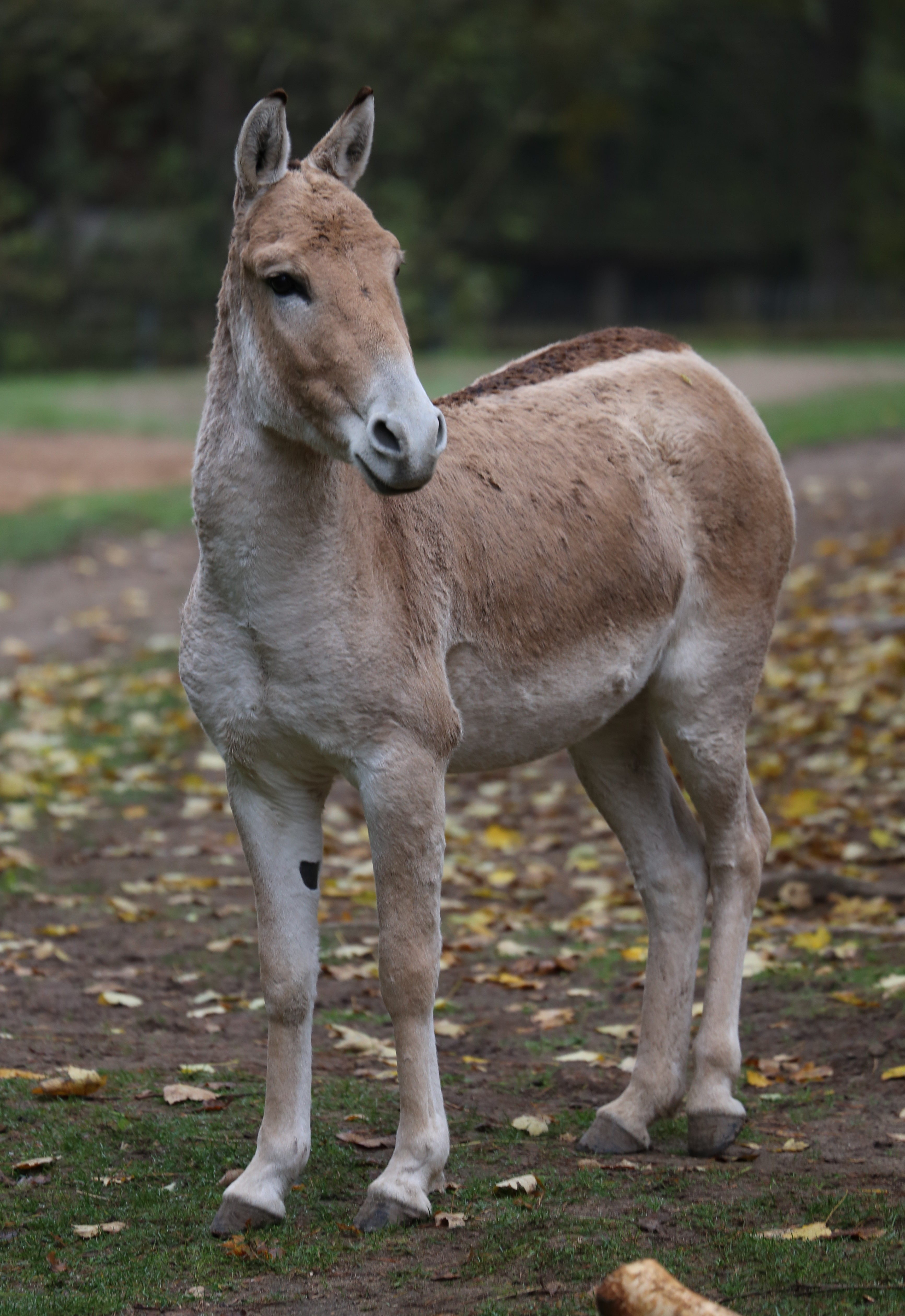 Kulan (Equus hemionus kulan), Tiergarten Nürnberg